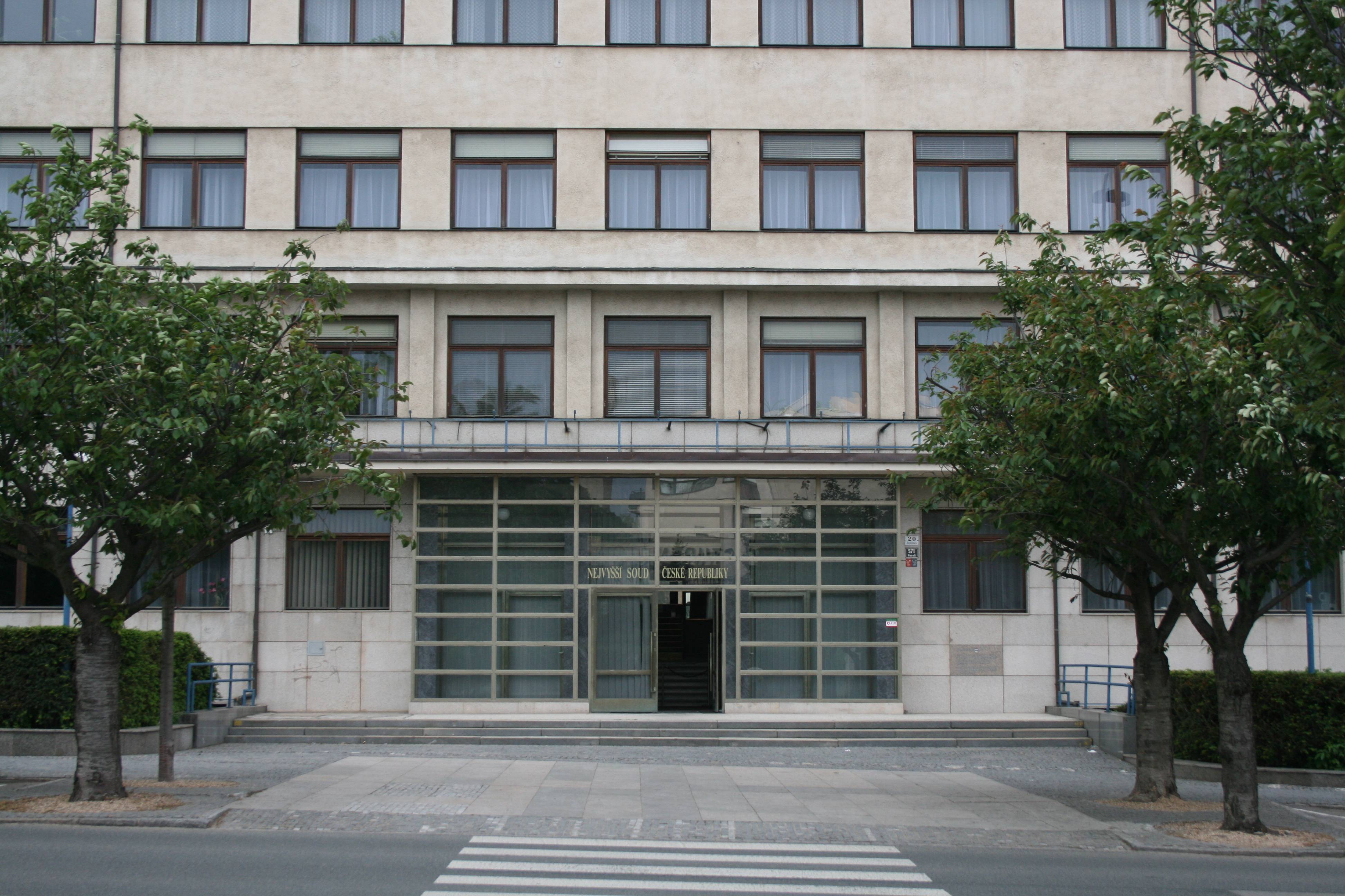 Budova Nejvyššího soudu České republiky v Brně, Burešova 20. Původně budova Všeobecného penzijního ústavu, postavená dle projektu architekta Emila Králíka z roku 1932.